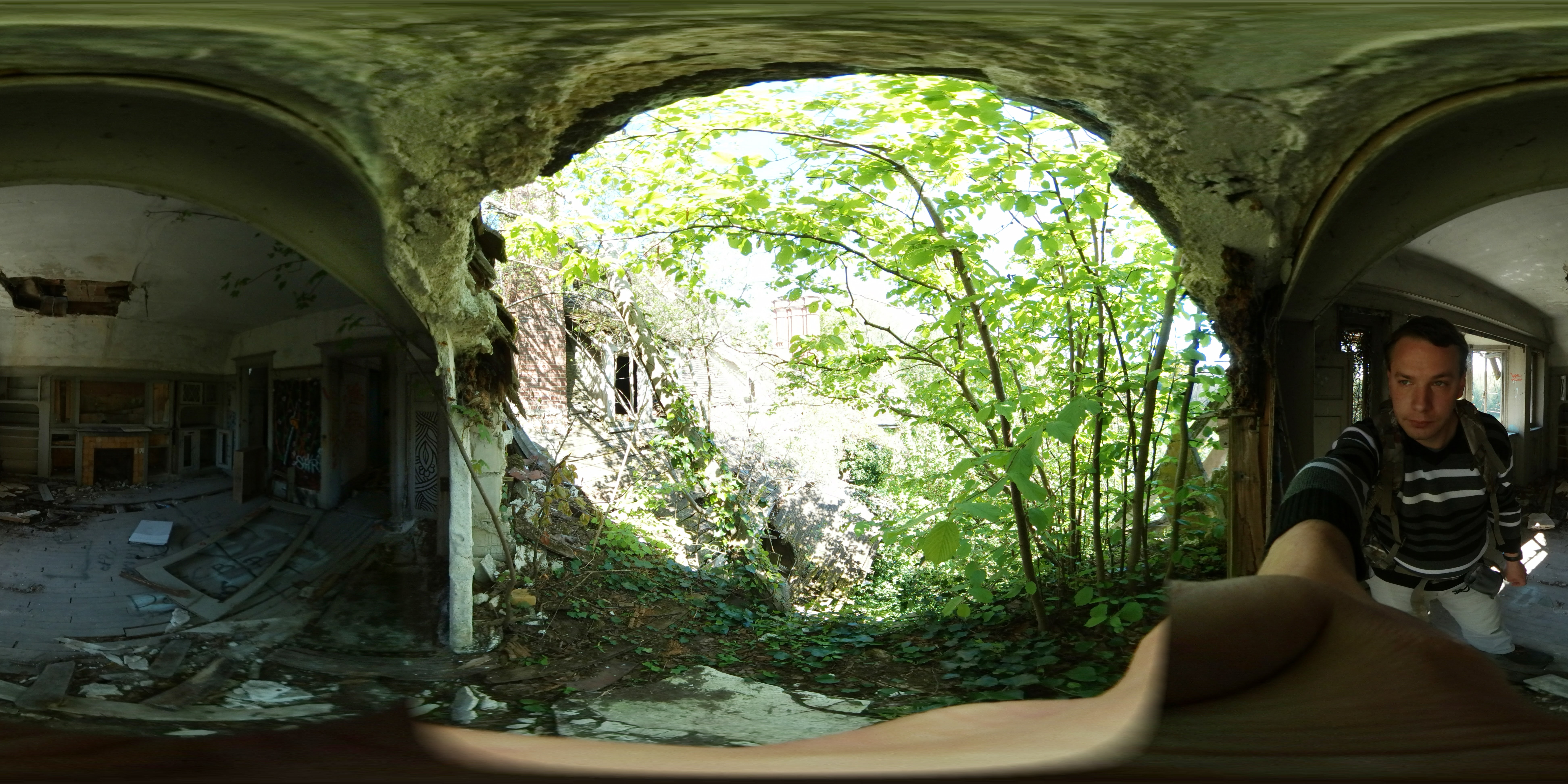 Le domaine des 3 colonnes en exploration urbaine